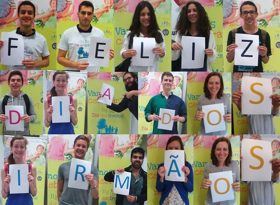 Grupo de jovens a festejar o Dia dos Irmãos